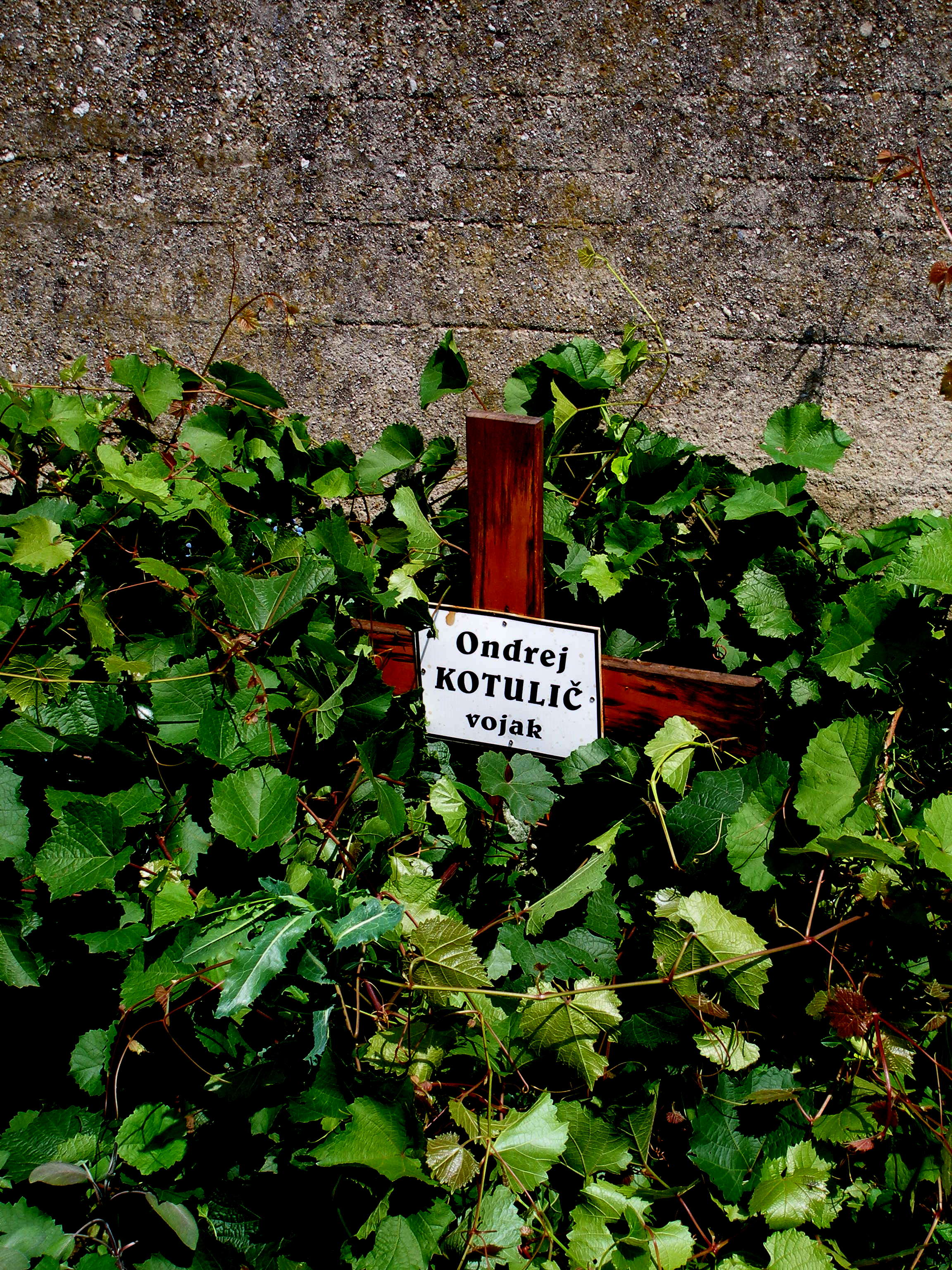 Cintorín, Bratislavská cesta, Piešťany. Hrob vojaka prezenčnej služby Slovenskej armády Ondreja Kotuliča, ktorý zahynul pri jej výkone v období existencie Slovenského štátu asi v roku 1940. Vojak sa narodil v obci Sedlice okres Prešov. Vojenskú prezenčnú službu vykonával v Novom Meste nad Váhom.